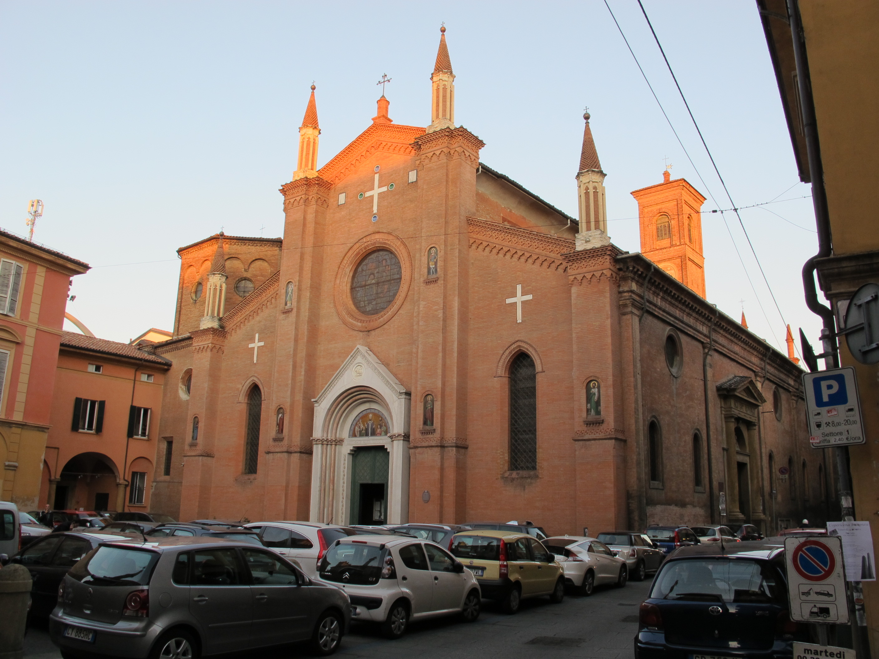 San martino maggiore, bologna